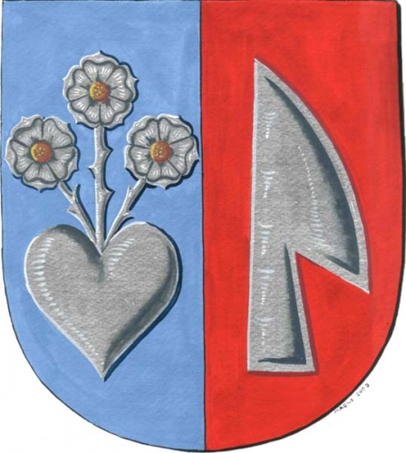 znak, Domamil, okres Třebíč